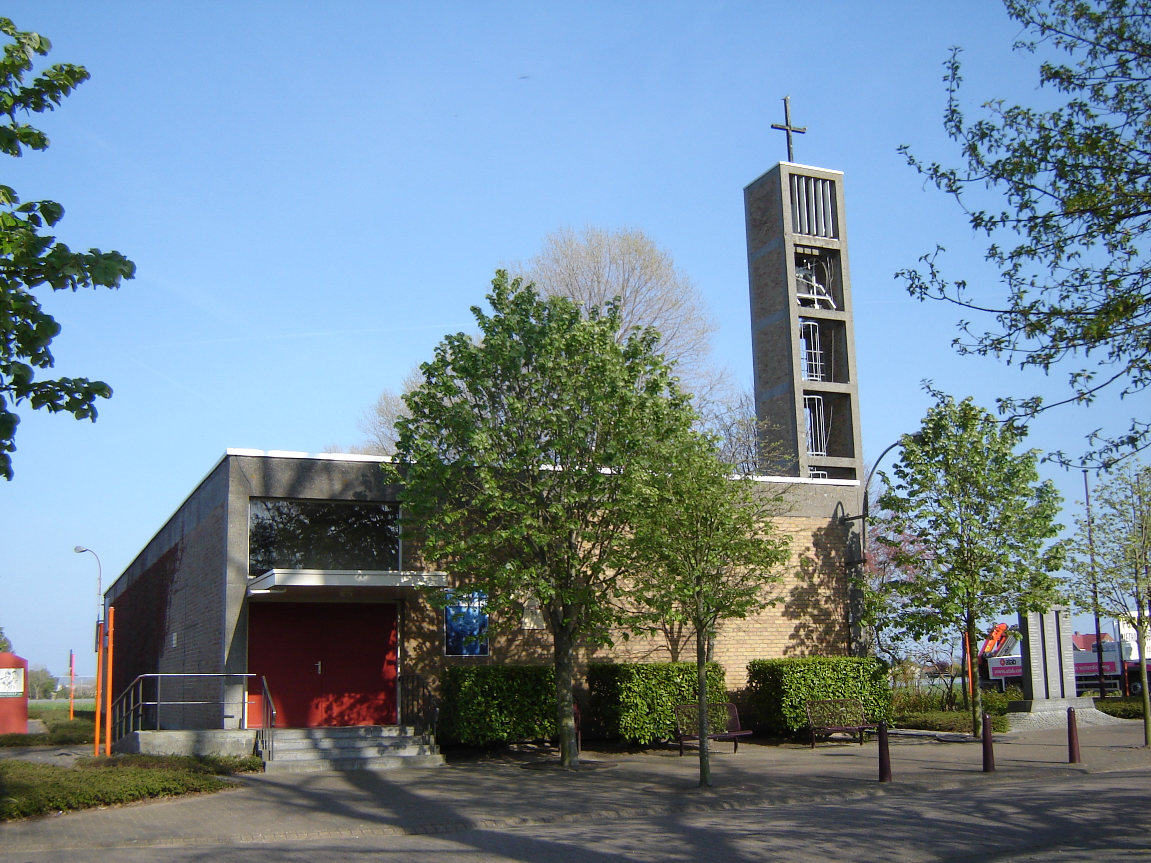 Moderne Sint-Michielskerk van Roksem (gebouwd in 1964) Modern church of Saint Michael in Roksem (built in 1964). Roksem, Oudenburg, West Flanders, Belgium